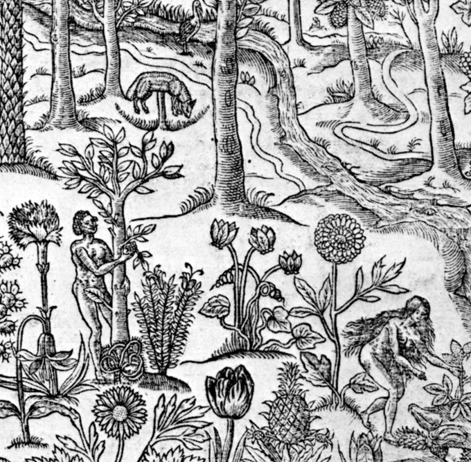 Частина ілюстрації Parkinson, John